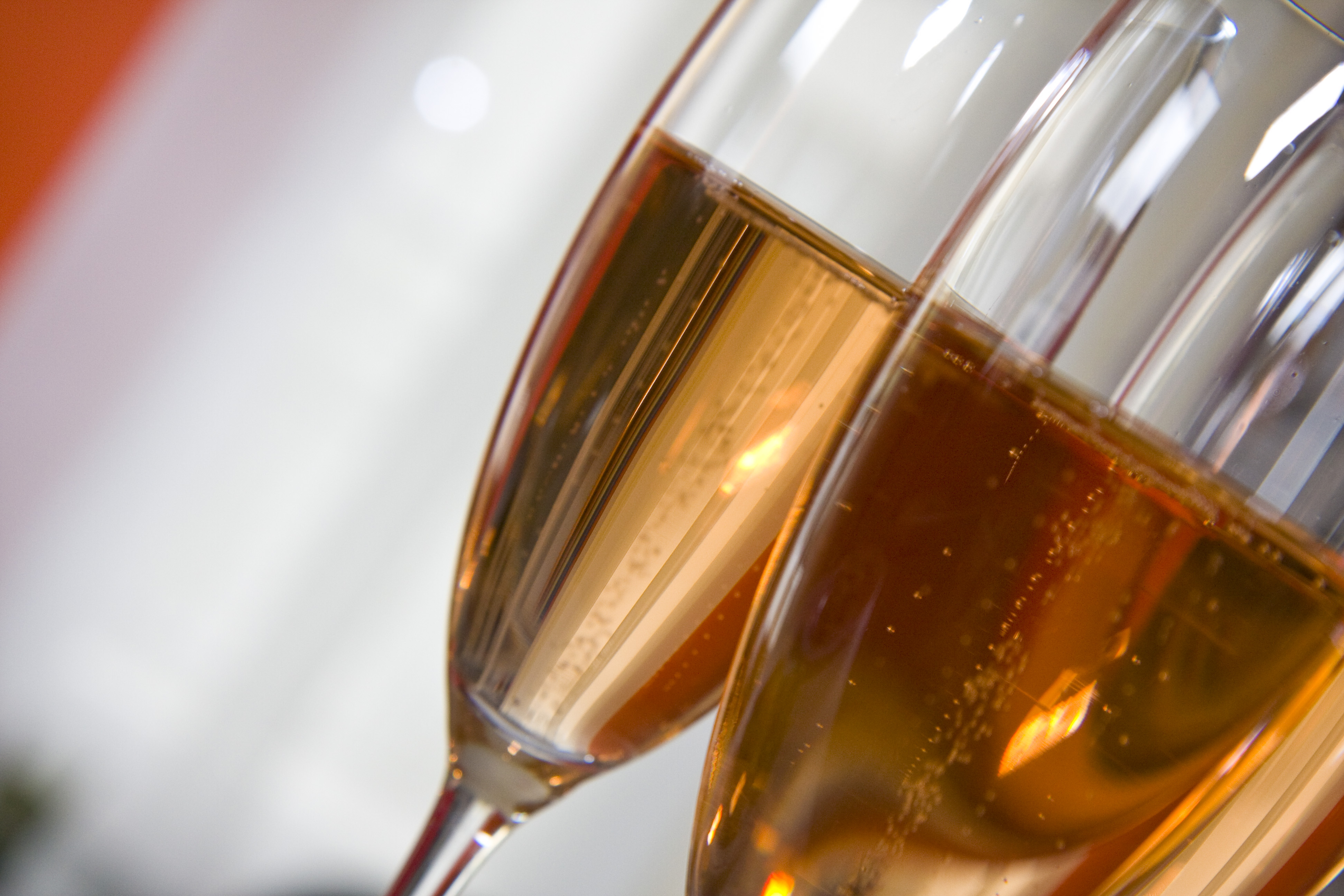 © FXR - March 2008